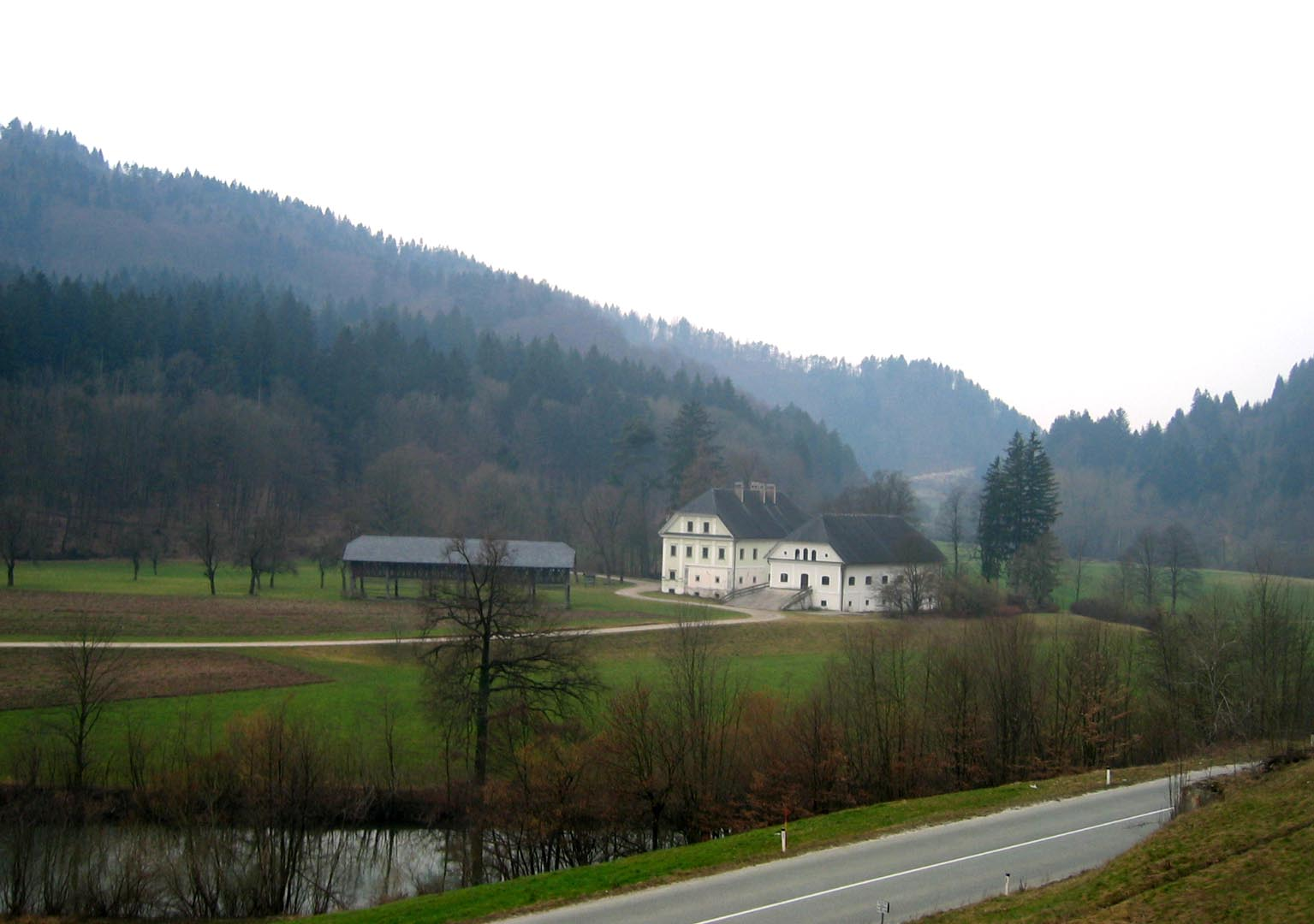 Visoko, Ivan Tavčar estate near Škofja Loka, Slovenia photo:Ziga 09:13, 25 February 2007 (UTC)